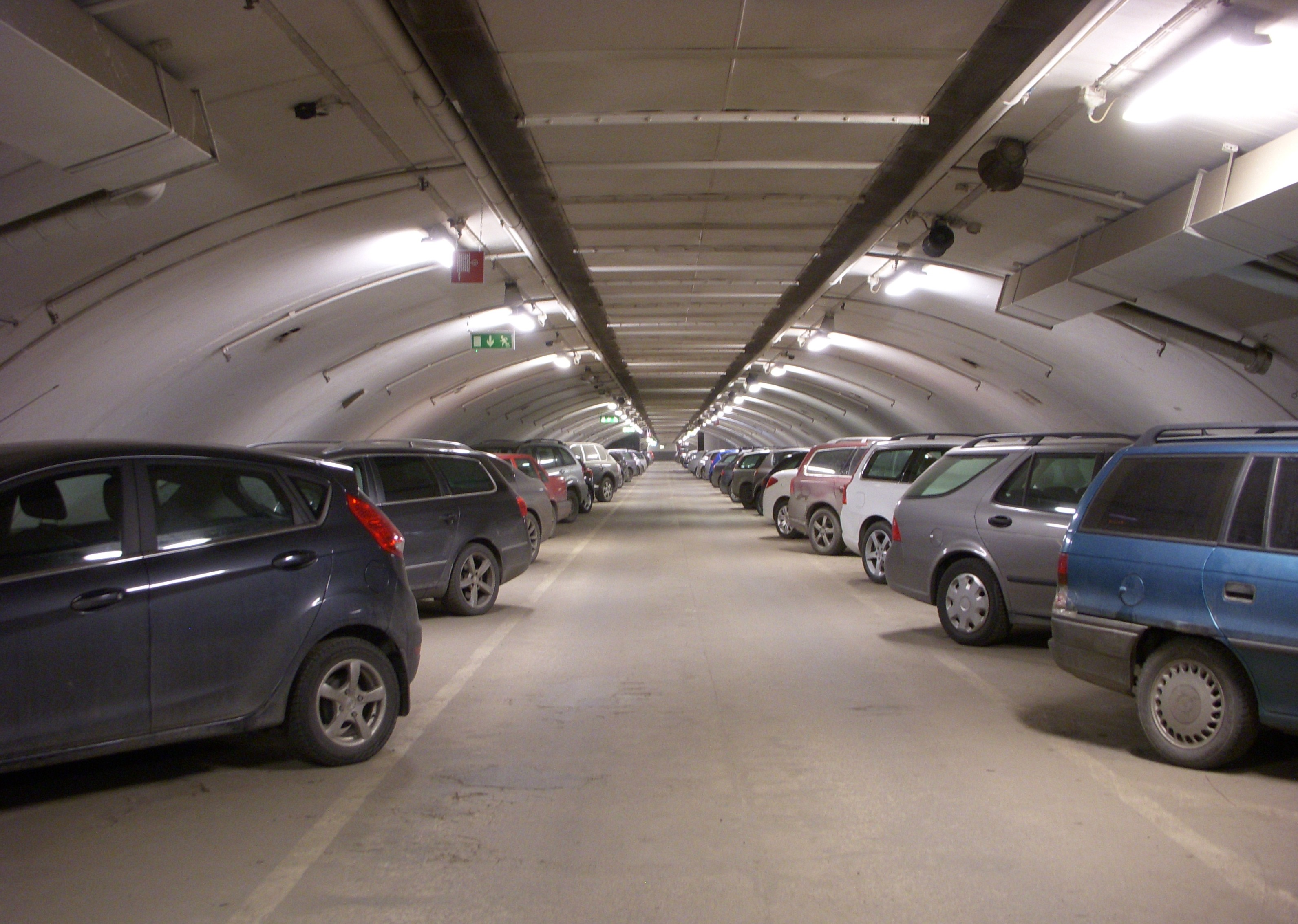 P-hus Slussen, Katarinabergets skyddsrum översta planet